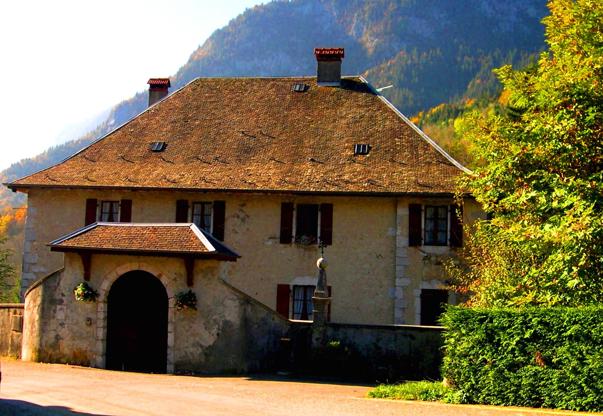 Bâtisse datant de 1782 - Le toit est en ardoises de Morzine.